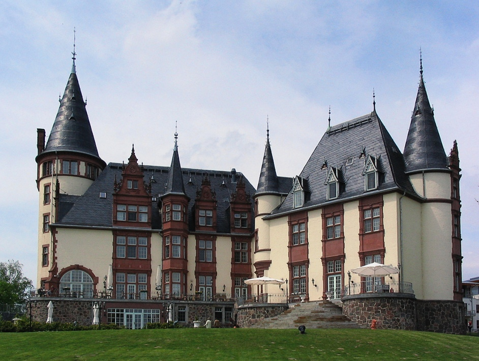 Beschreibung: Hotel Schloss Klink - Seeseite Fotograf: Darkone, 14. Mai 2005